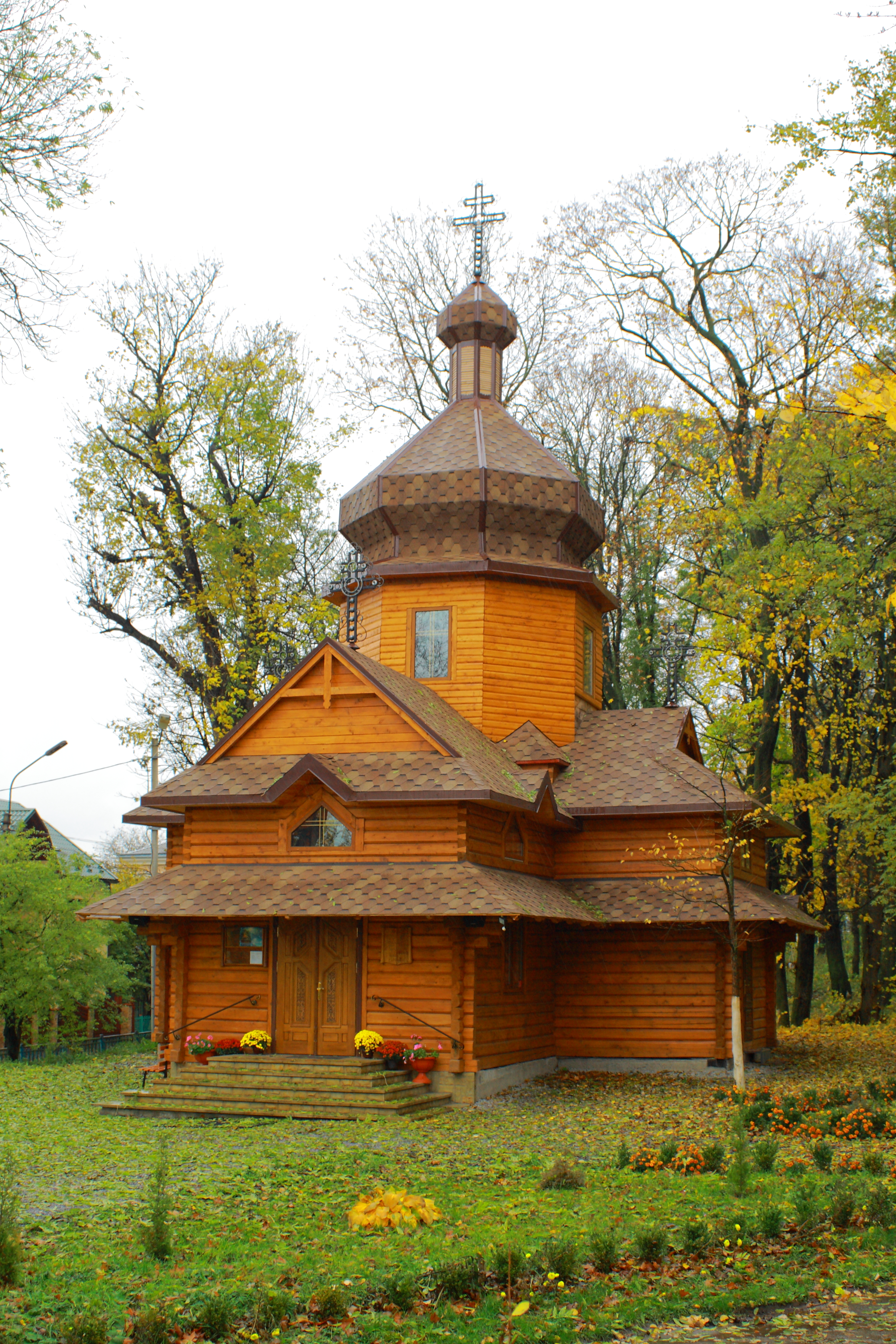 Дерев'яна церква, зведена 2008 року